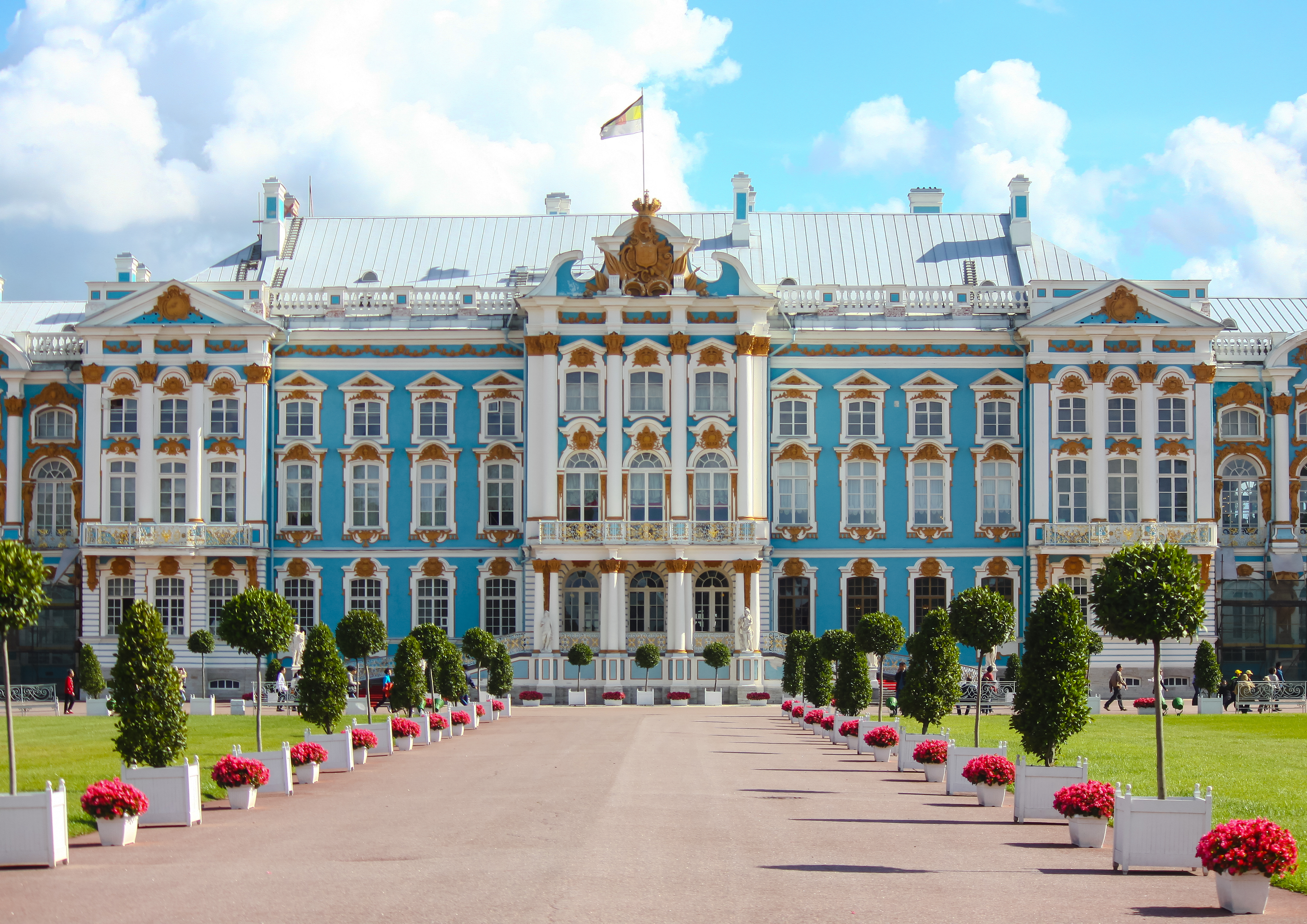 Екатерининский дворец и парк (музей-заповедник «Царское село») (Санкт-Петербург и Лен.область, Павловск, Екатерининский парк, Парковая улица, Садовая улица, 7)